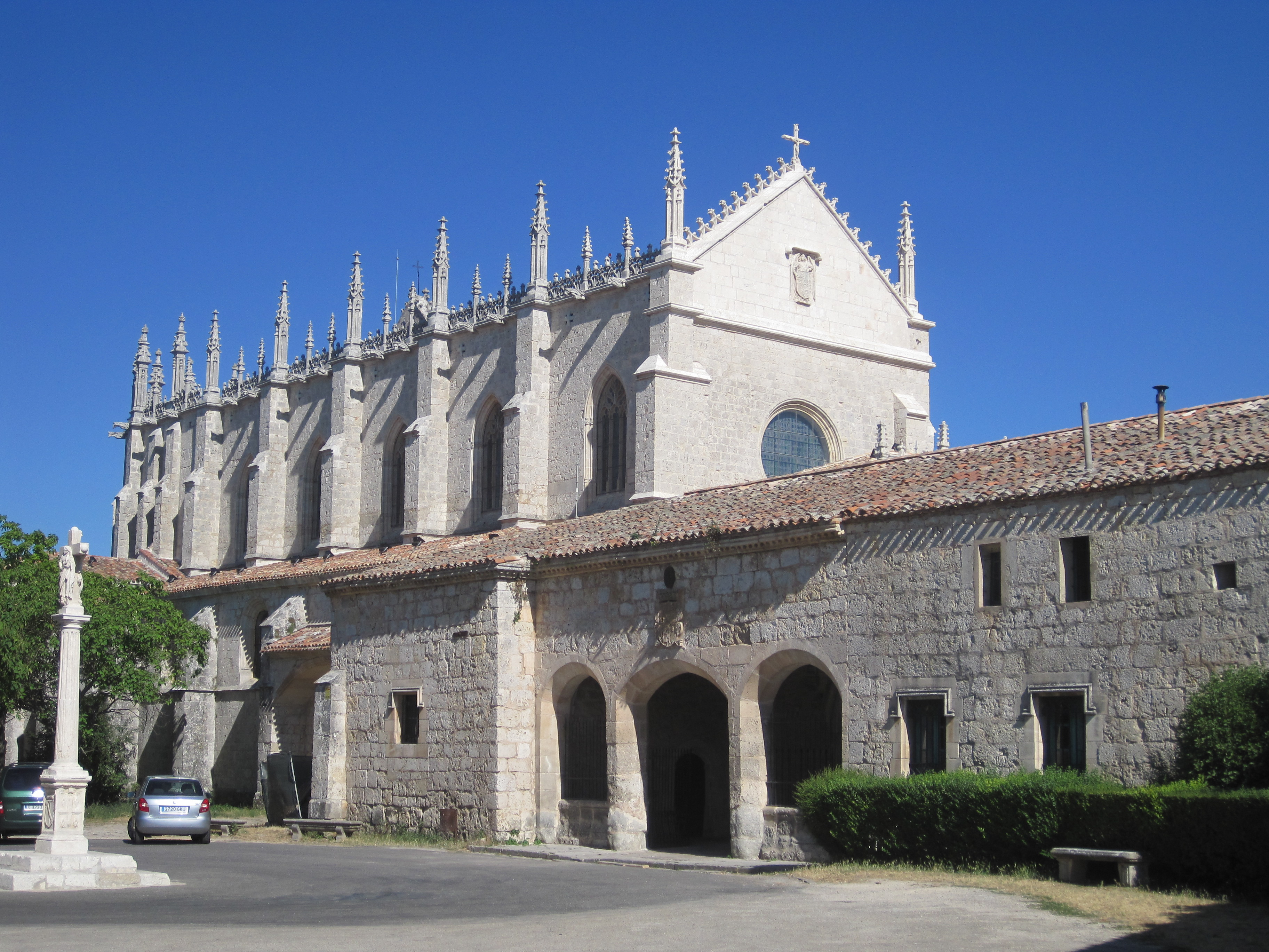 Vista exterior de la Cartuja de Miraflores, en Burgos.